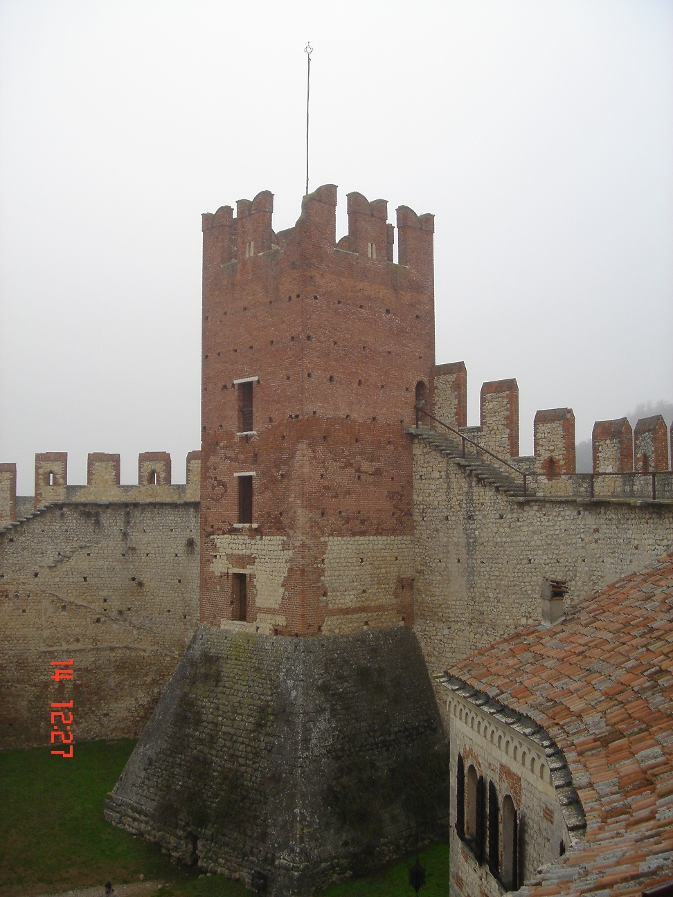 Una torre del Castello di Soave